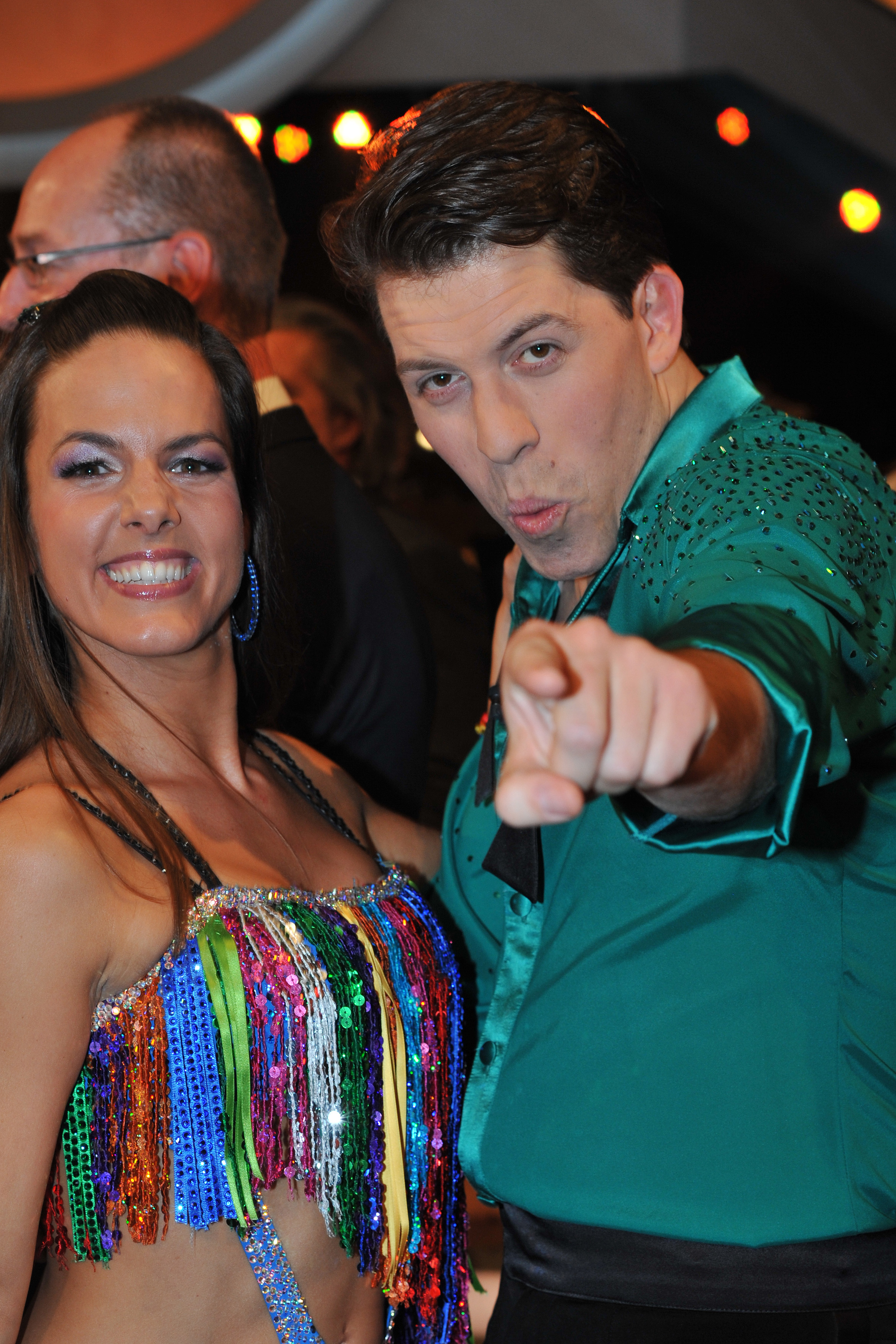 ORF Dancing Stars 2014: Daniel Serafin und Roswitha Wieland